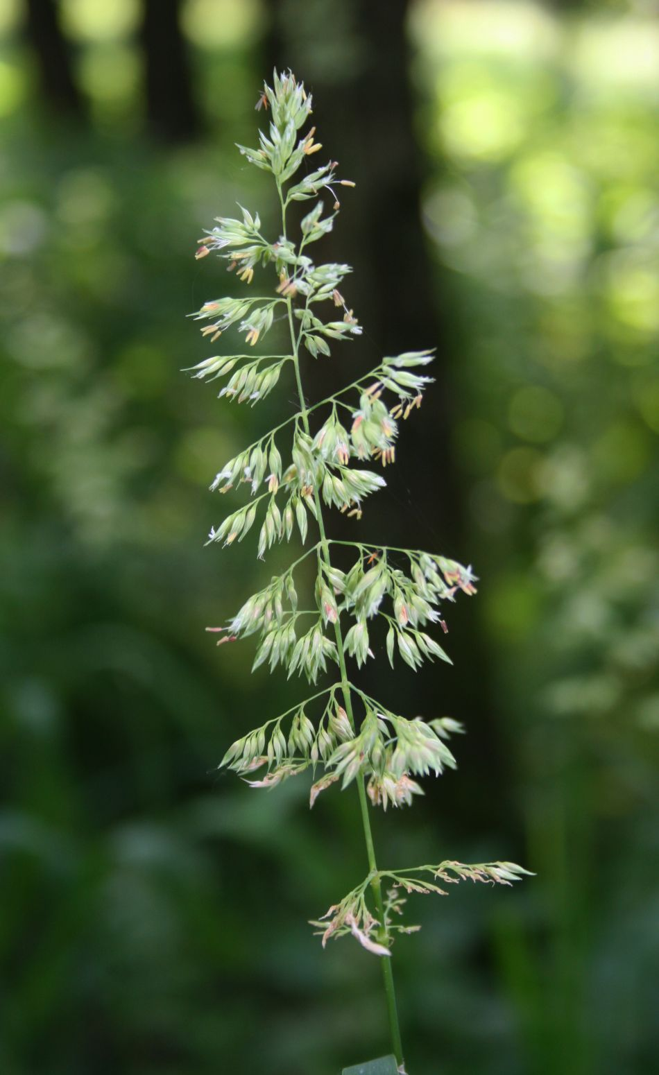 Rohr-Glanzgras (Phalaris arundinacea), Süßgräser (Poaceae) - Österreich/Austria/Autriche: Oberösterreich, Hausruckviertel, Niederholzham N Schwanenstadt